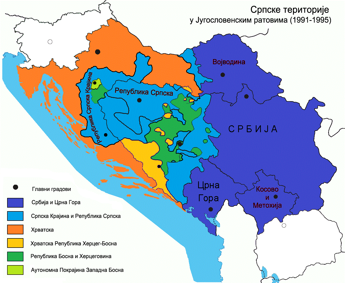 Teritorije pod kontrolom srpskih snaga tokom Jugoslovenskih ratova (1991-1995). „Srpske snage“ su, po definiciji Međunarodnog krivičnog suda za bivšu Jugoslaviju, bile: Jugoslovenska narodna armija (JNA), kasnije Vojska Jugoslavije (VJ), novoformirana srpska teritorijalna odbrana BiH i Hrvatske, Vojska Republike Srpske Krajine, Vojska Republike Srpske, teritorijalna odbrana Srbije i Crne Gore, policija Srbije i Republike Srpske, uključujući i državnu bezbednost, specijalne policijske snage Krajine, poznate kao „Martićevci“, kao i sve srpske paravojne formacije i dobrovoljačke jedinice (Šešelj ICTY Case information sheet).